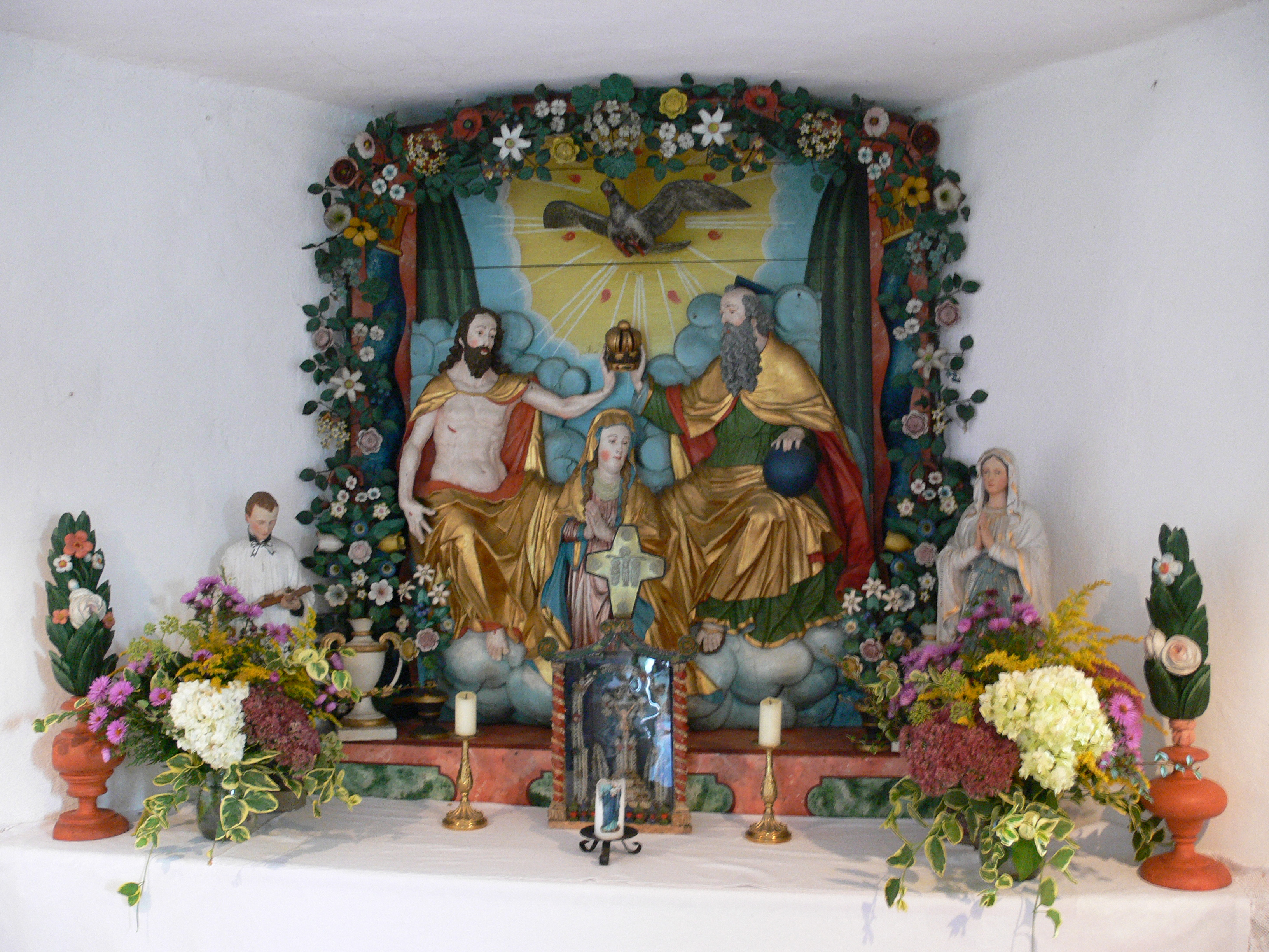 Kapelle Abetsweiler, Gemeinde Bergatreute, Landkreis Ravensburg Marienkrönung aus der Zürn-Werkstatt, um 1630